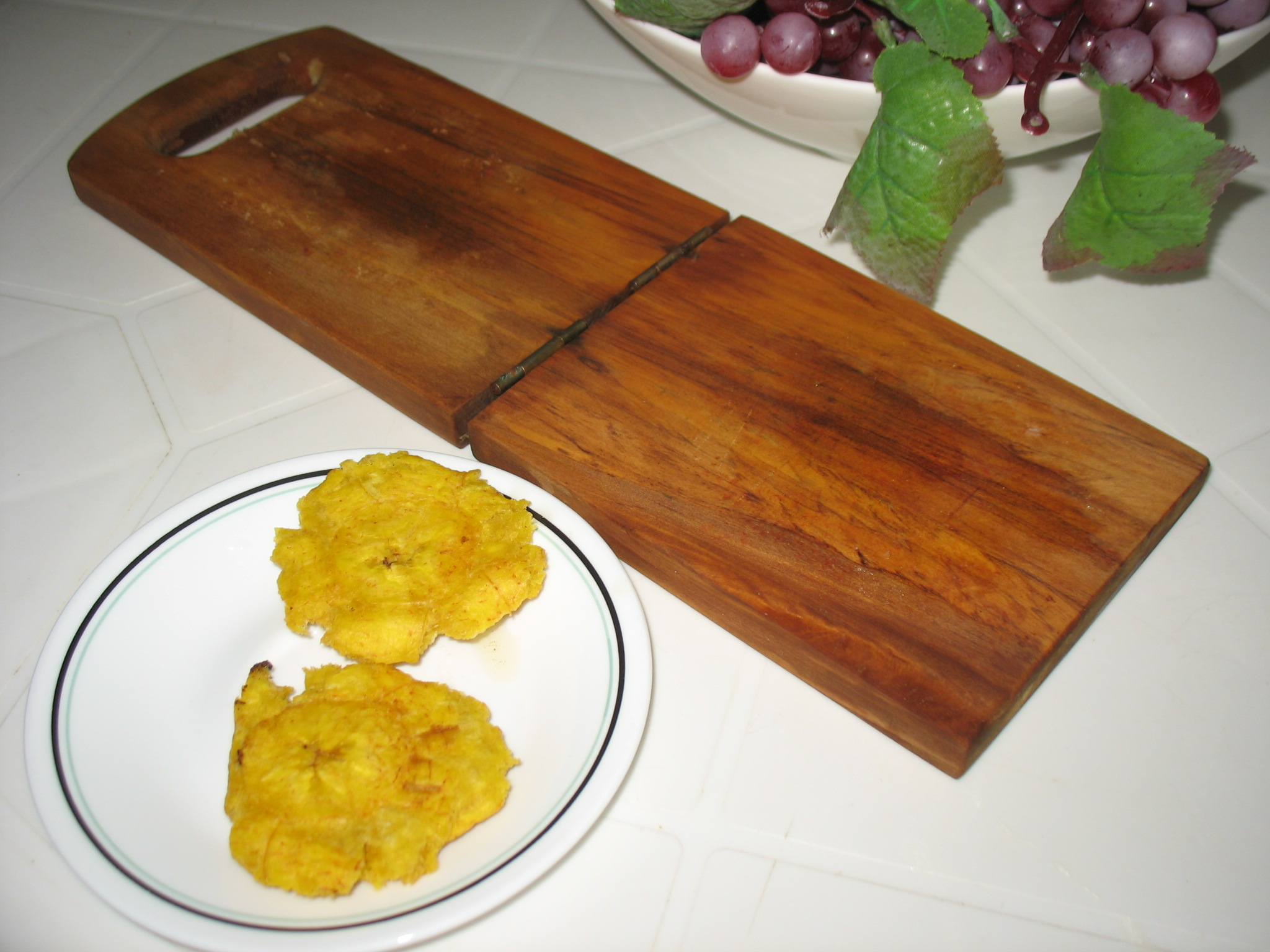 Patacones y pataconera